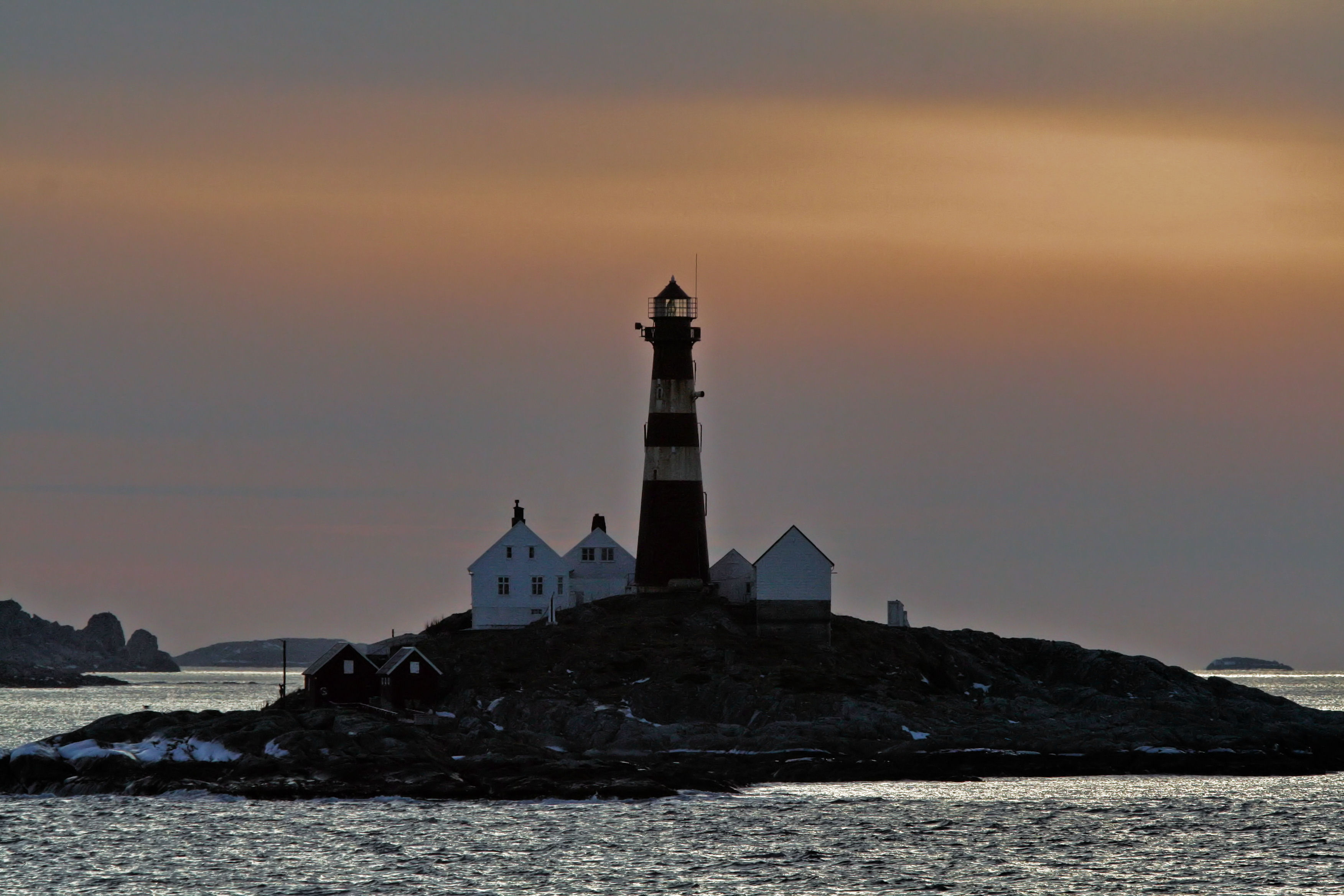 Landegode Fyr near Bodø, Norway. Winter 2006-2007